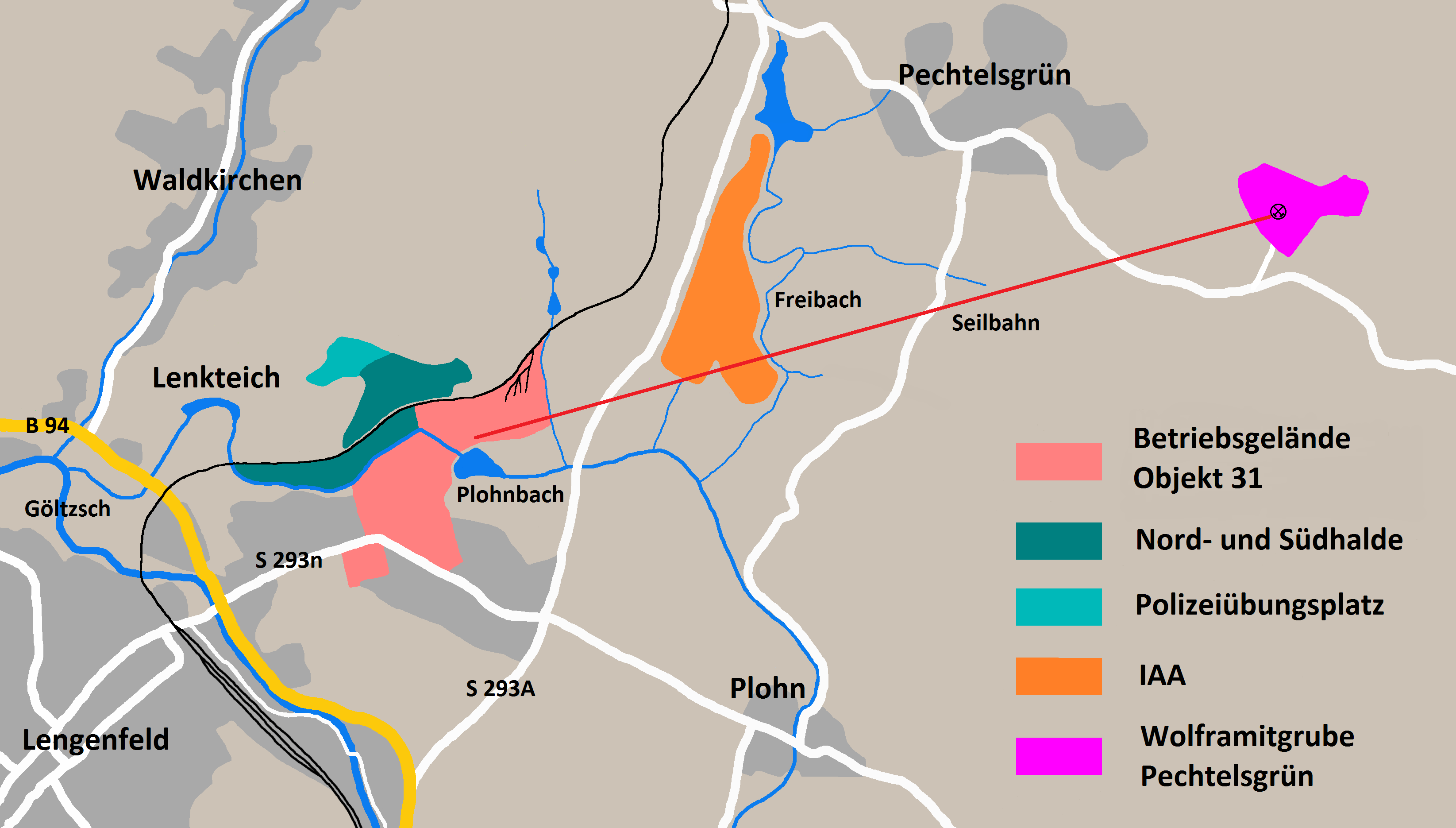 Gebiet Objekt 31 und Wolframitgrube Pechtelsdgrün gezeichnet nach OSM-Karteneditor